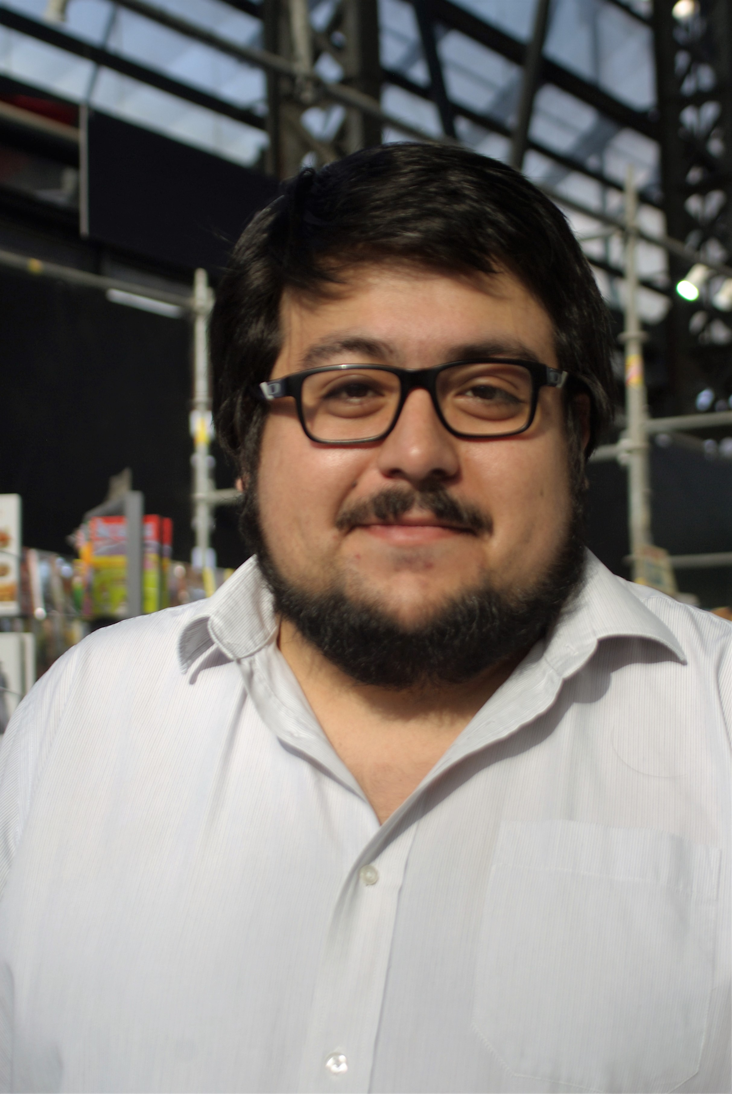 El escritor chileno Diego Zúñiga en la Feria Internacional del Libro de Santiago 2016